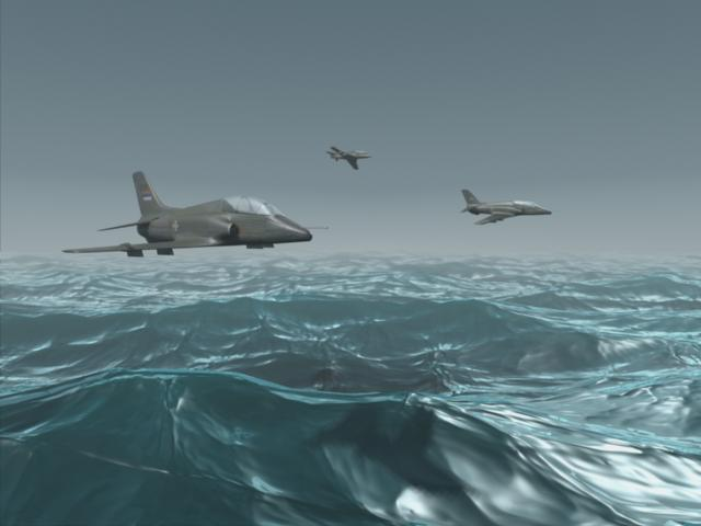 3Д модели Г4 Супергалеба у прелету изнад океана.